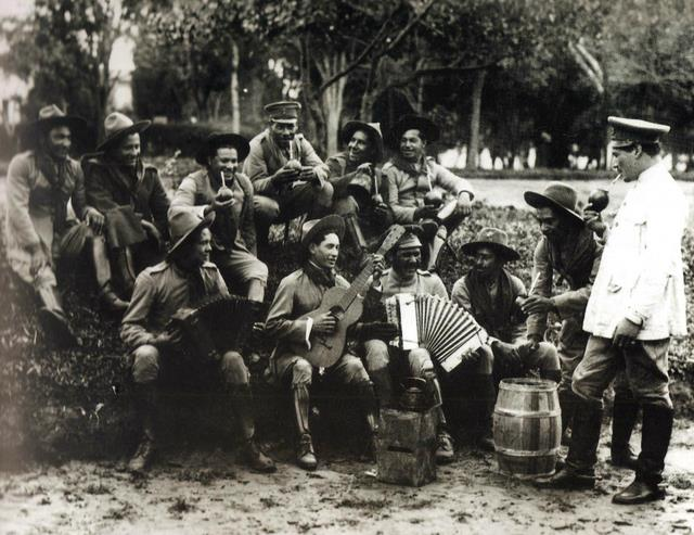 Revolucionários de 30 acampados em São Paulo, Acervo Iconographia, Pinacoteca do Estado, São Paulo.